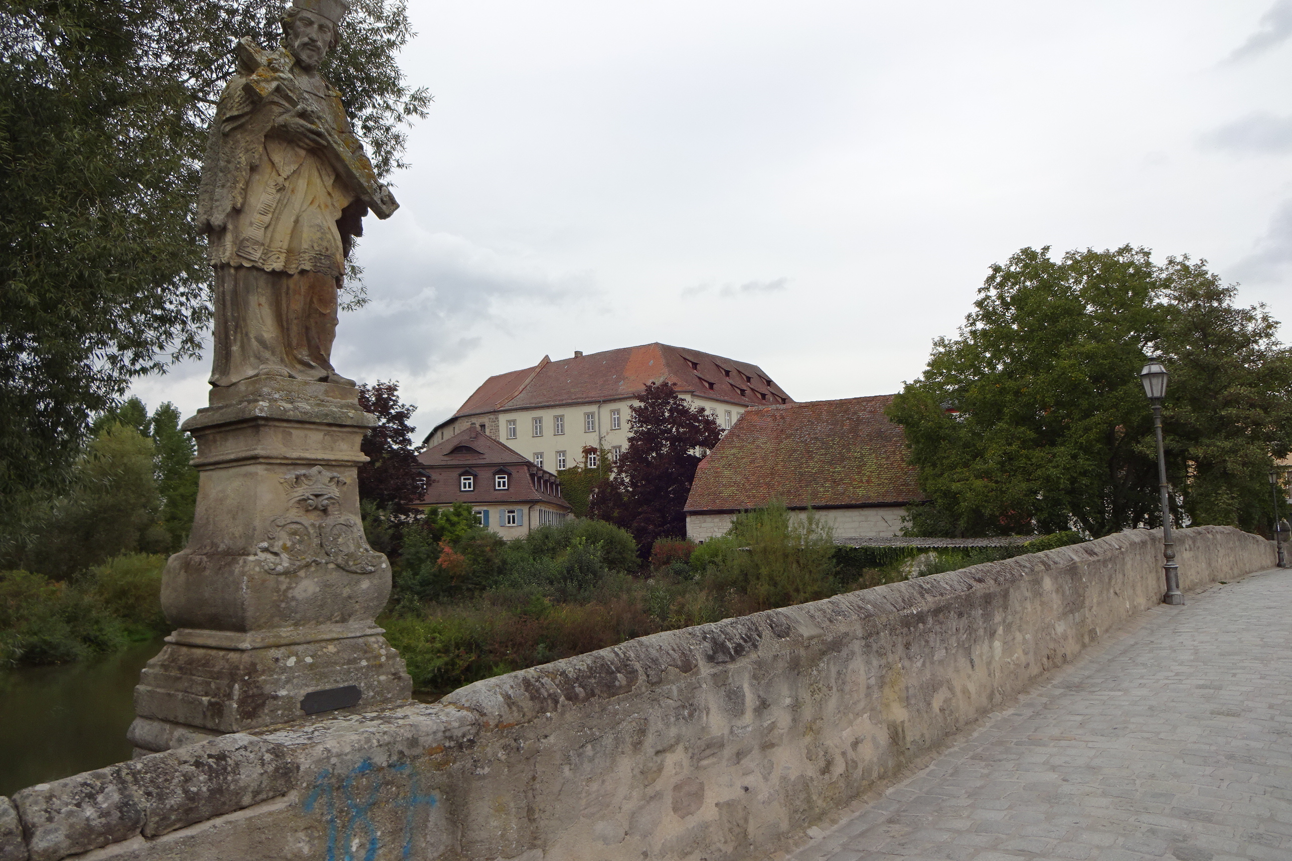 Alte Aisch Brücke von 1391 in Höchstadt mit Brückenheiligen Nepomuk - im Hintergrund das Alte Schloss